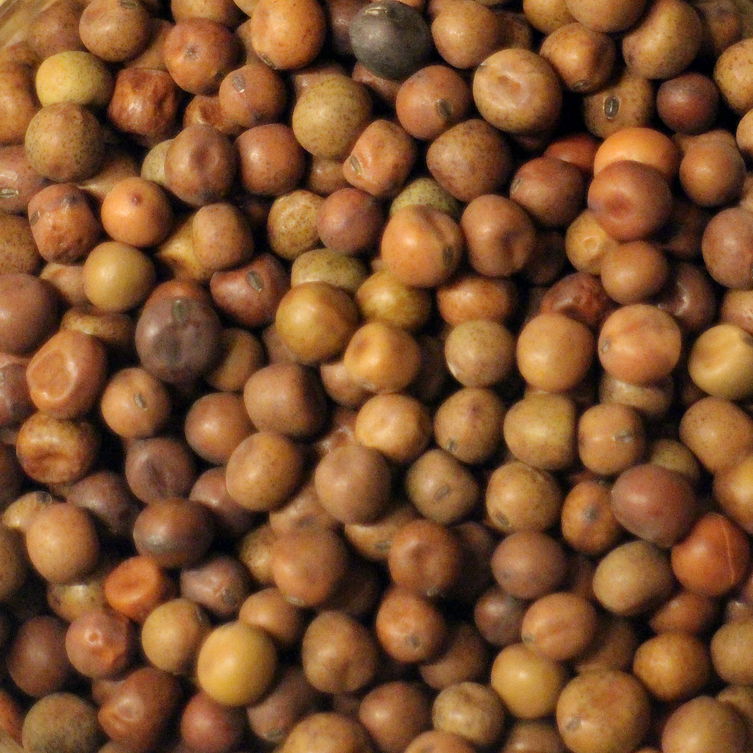 Gråärt odlad och torkad i Dalarna, Sverige 2017